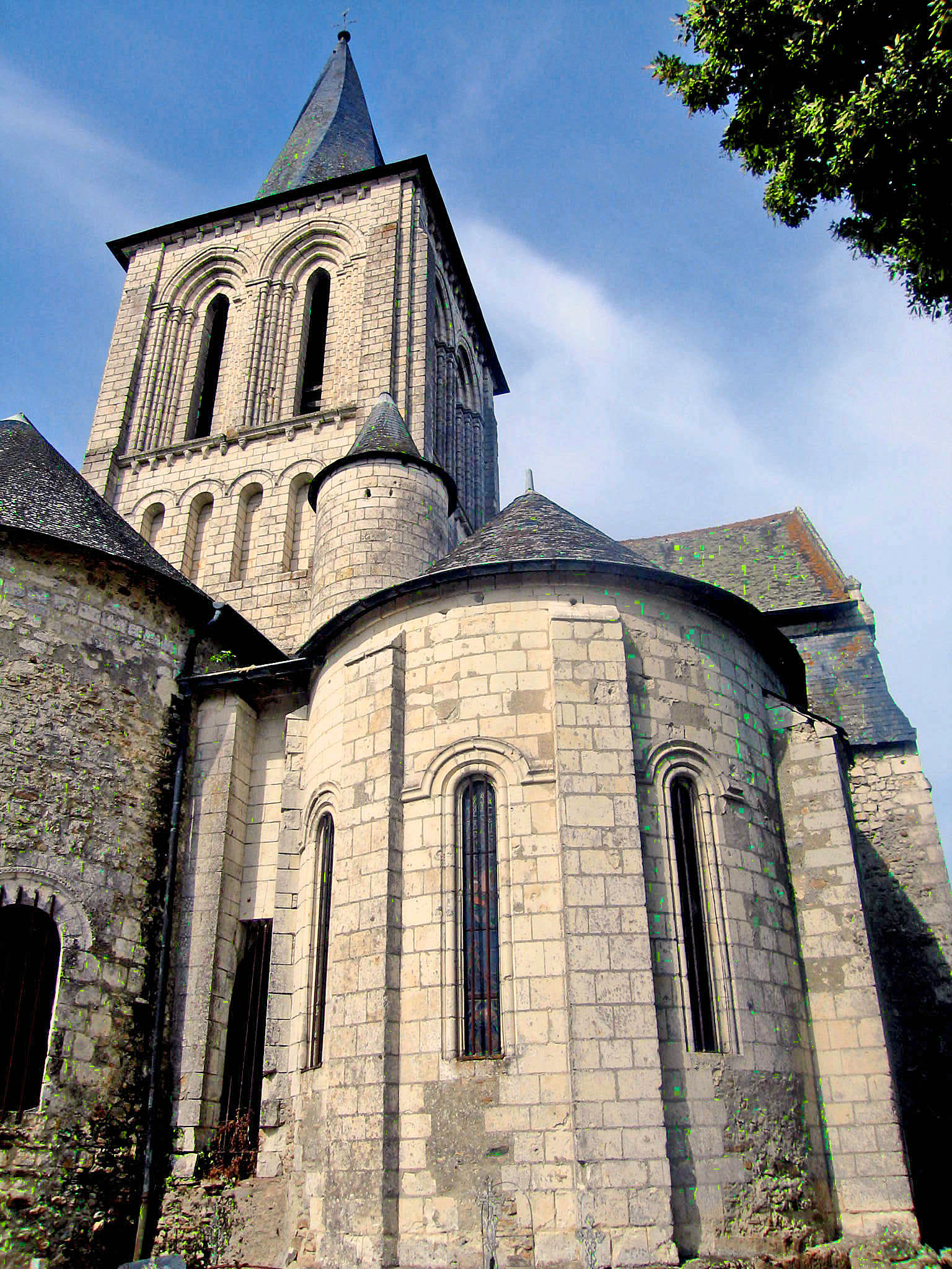 12è 13è siècle .